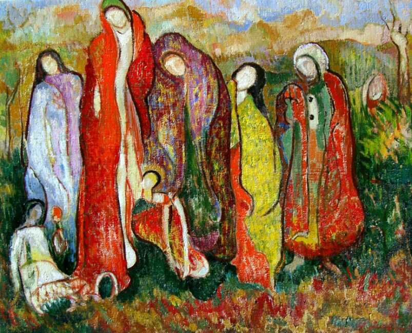 Komposition, George Stefanescu, Öl/Leinwand, 1982, Privat sammlung Dipl.Ing.Arch.Radu Stefanescu-Gross, Lüdinghausen, Deutschland.